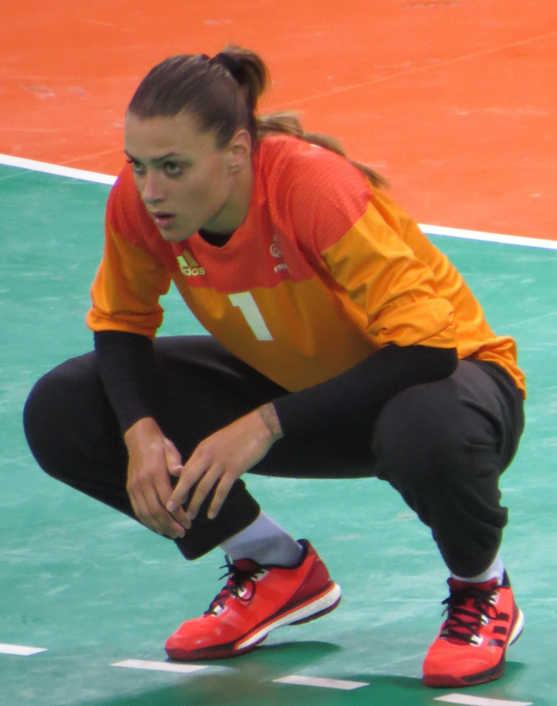 Rio 2016. sx 221 - Laura Glauser, French goalkeeper